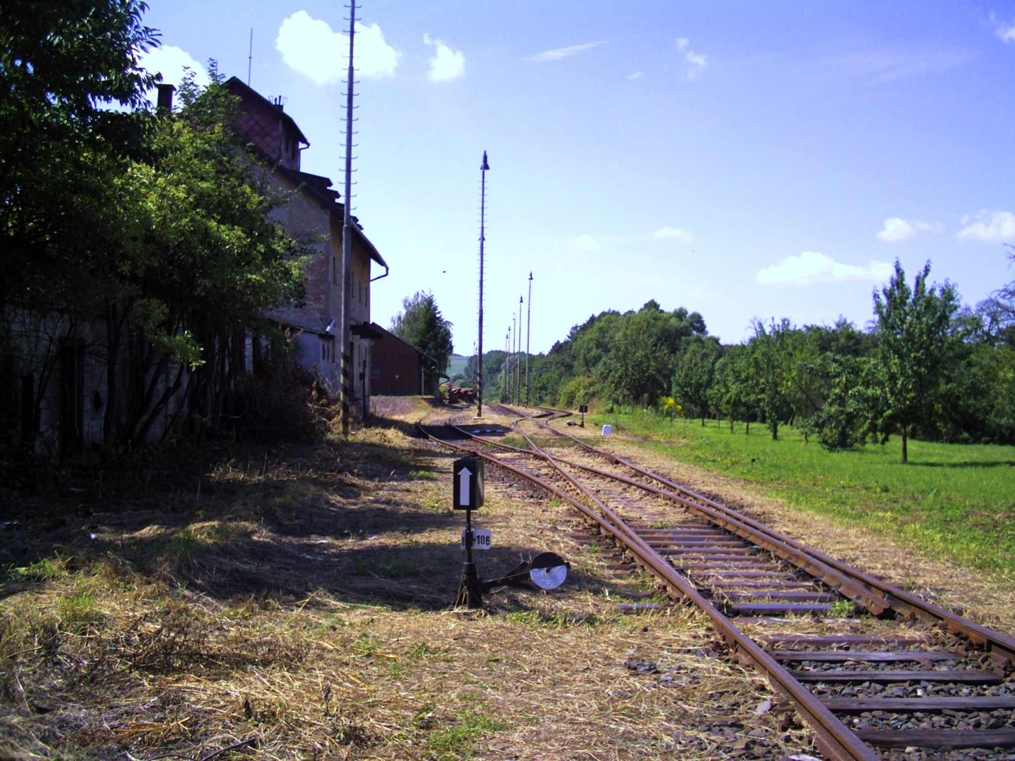 Fotografie železniční stanice Koryčany (vlečka Nemotice - Koryčany), náležící trati č. 340.